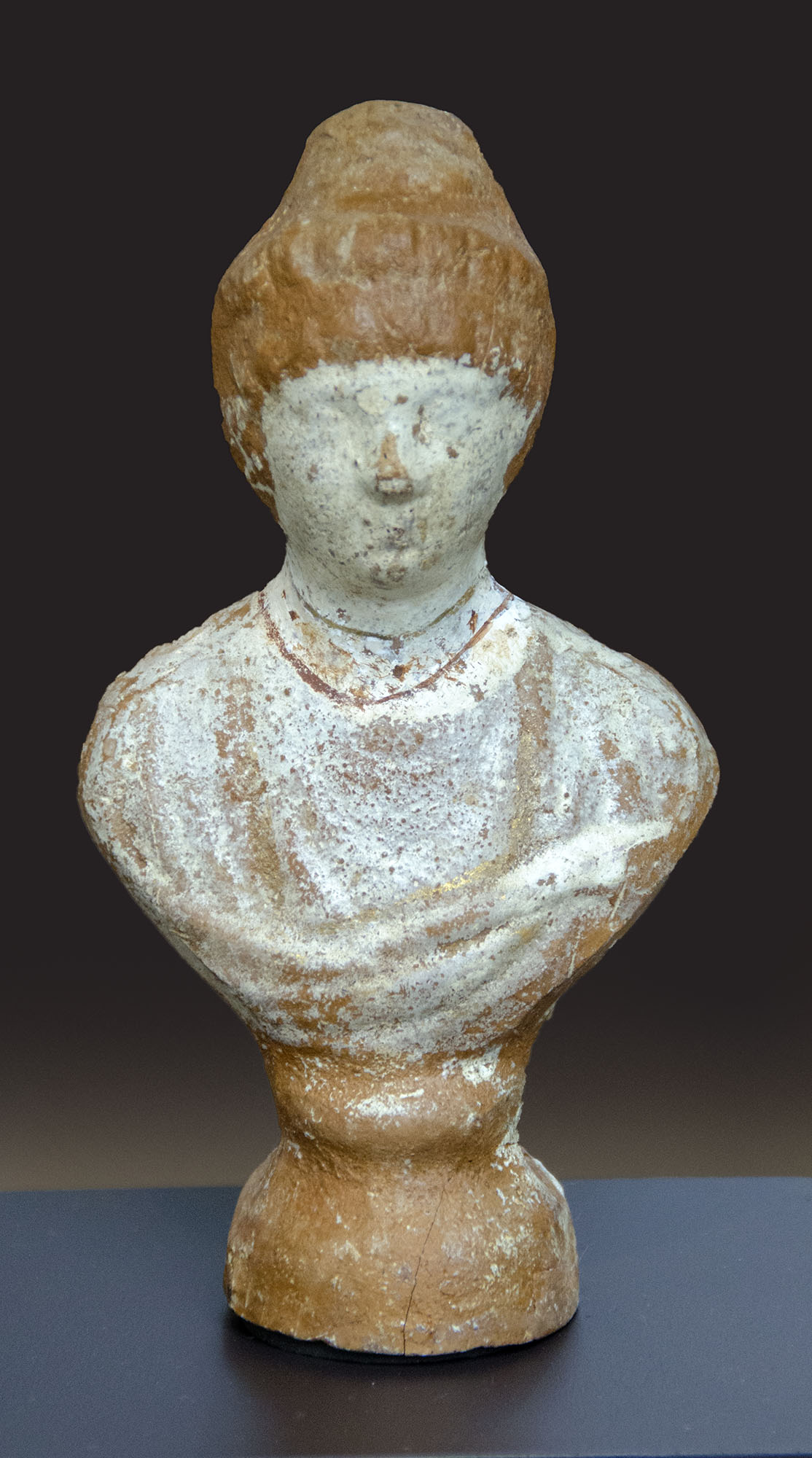 Figura encontrada en la tumba de una niña en Corduba (Córdoba), siglo II.